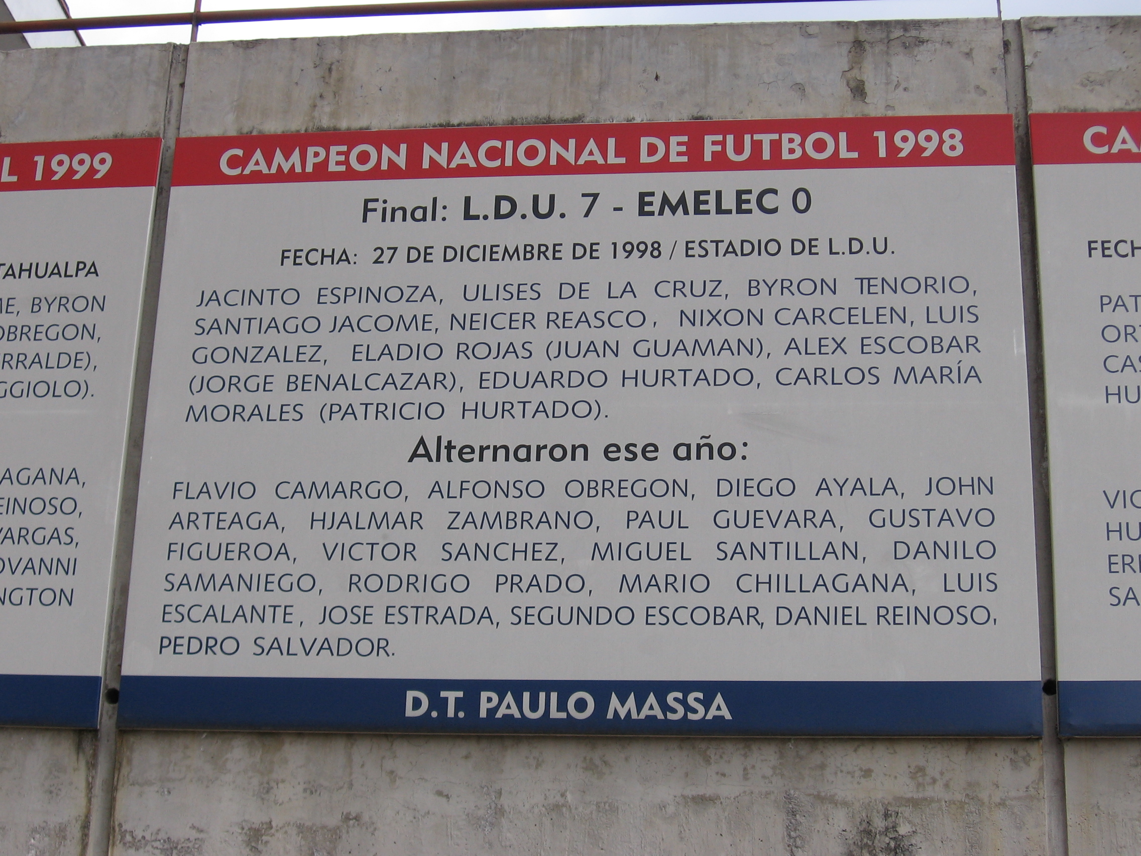 Placa LDU Campeón 1998